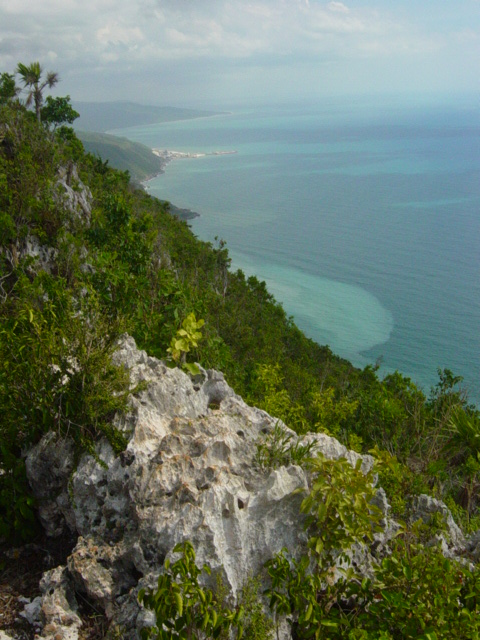 Lovers' Leap Point on jamaica